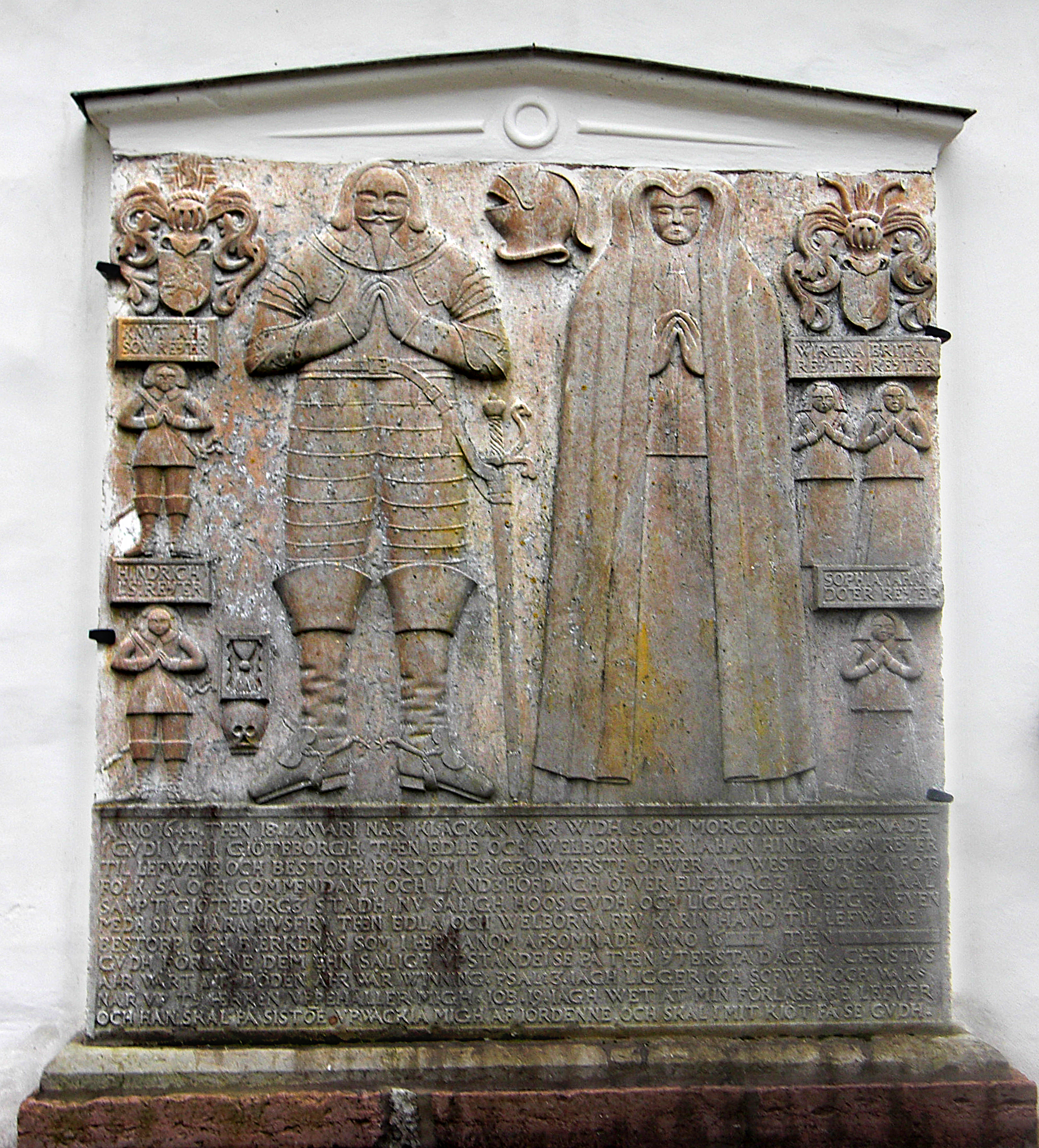 Gravhäll från 1644 på ytterväggen till Levene kyrka i Viste härad, Vara kommun, f.d. Skaraborgs län, Skara stift, Västergötland, Västra Götalands län, Sverige.